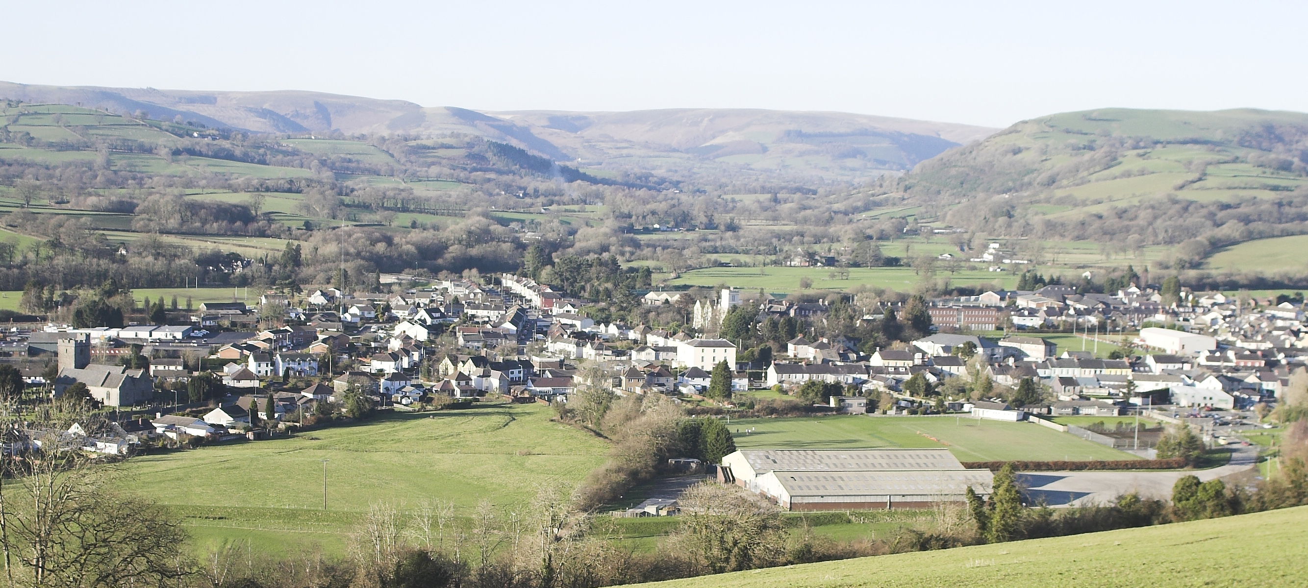 Панорамен изглед от Ландъври